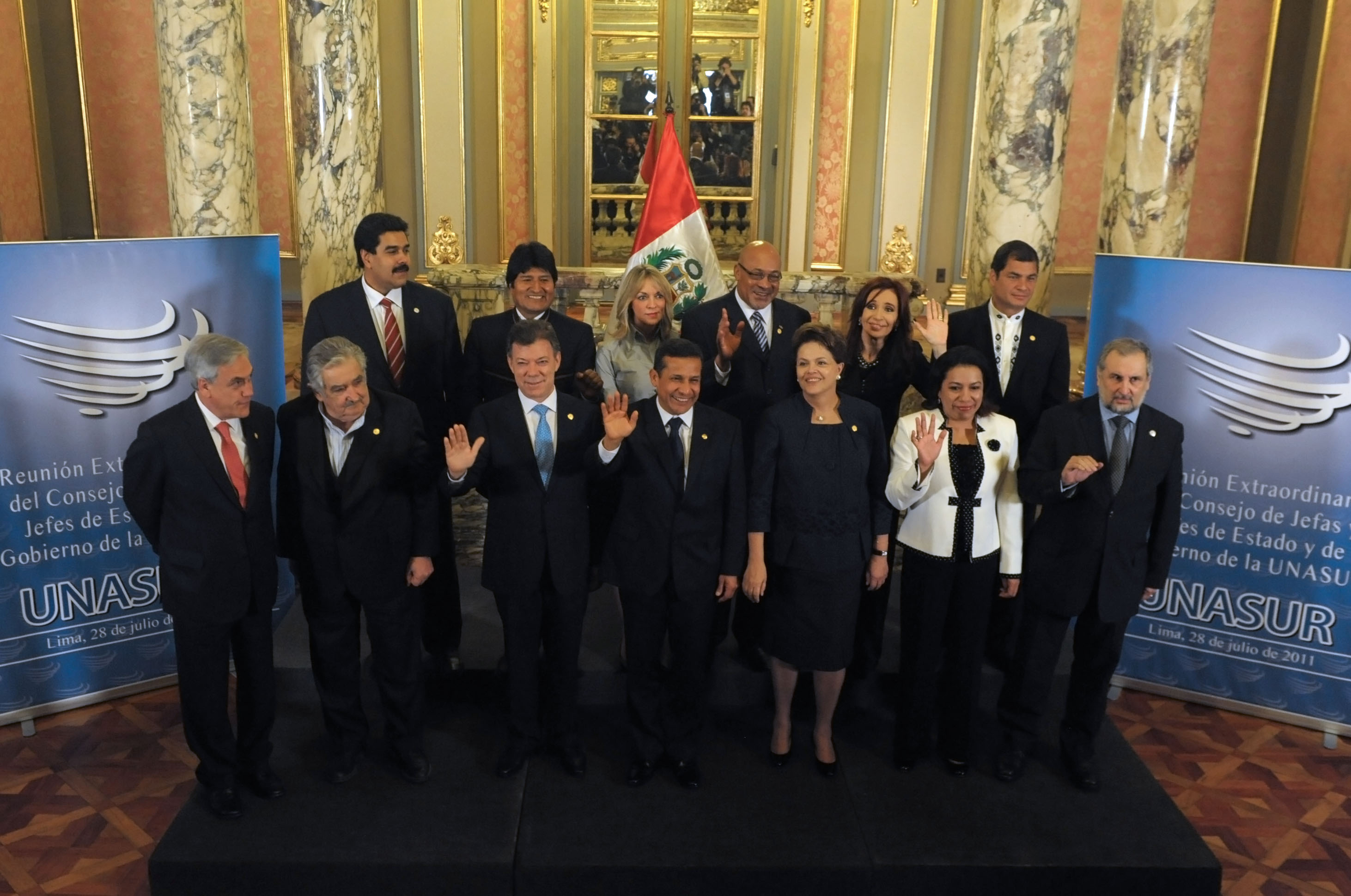 La presidenta Cristina Fernández saluda junto a los mandatarios de Unasur, tras la asunción del presidente de Perú, Ollanta Humala.